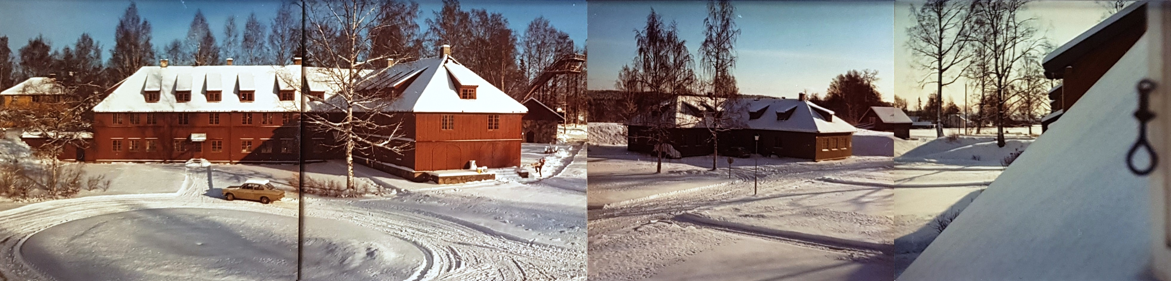 1973.01.15 Panorama fra venstre Rektorboligen, Artilleribygningen, Krutthuset, Hoppbakken, Smia og takflaten på Kommandantboligen på Blaker skanse. (Mangler kun en liten bit på midten.)